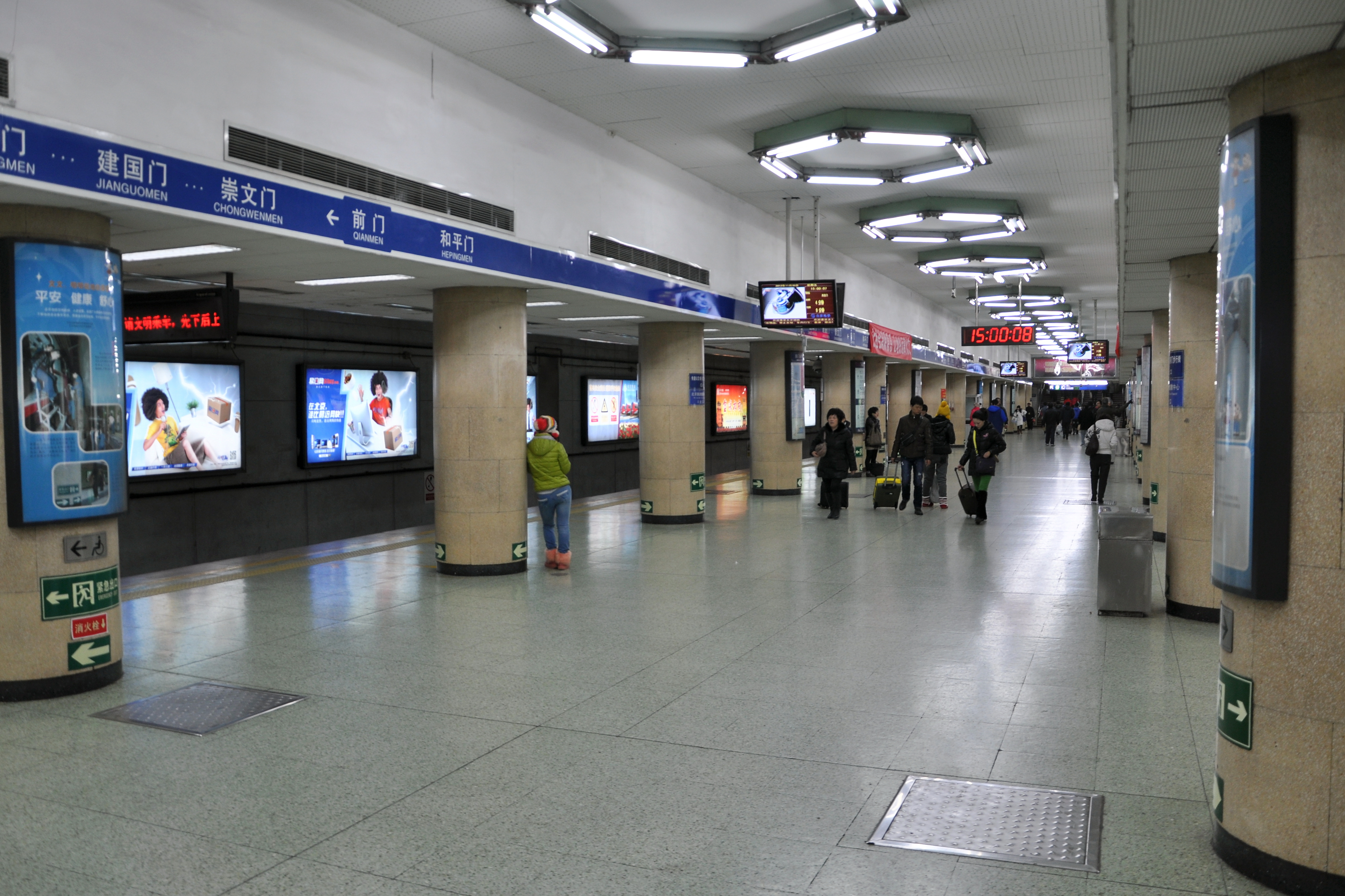 北京地铁2号线前门站站台